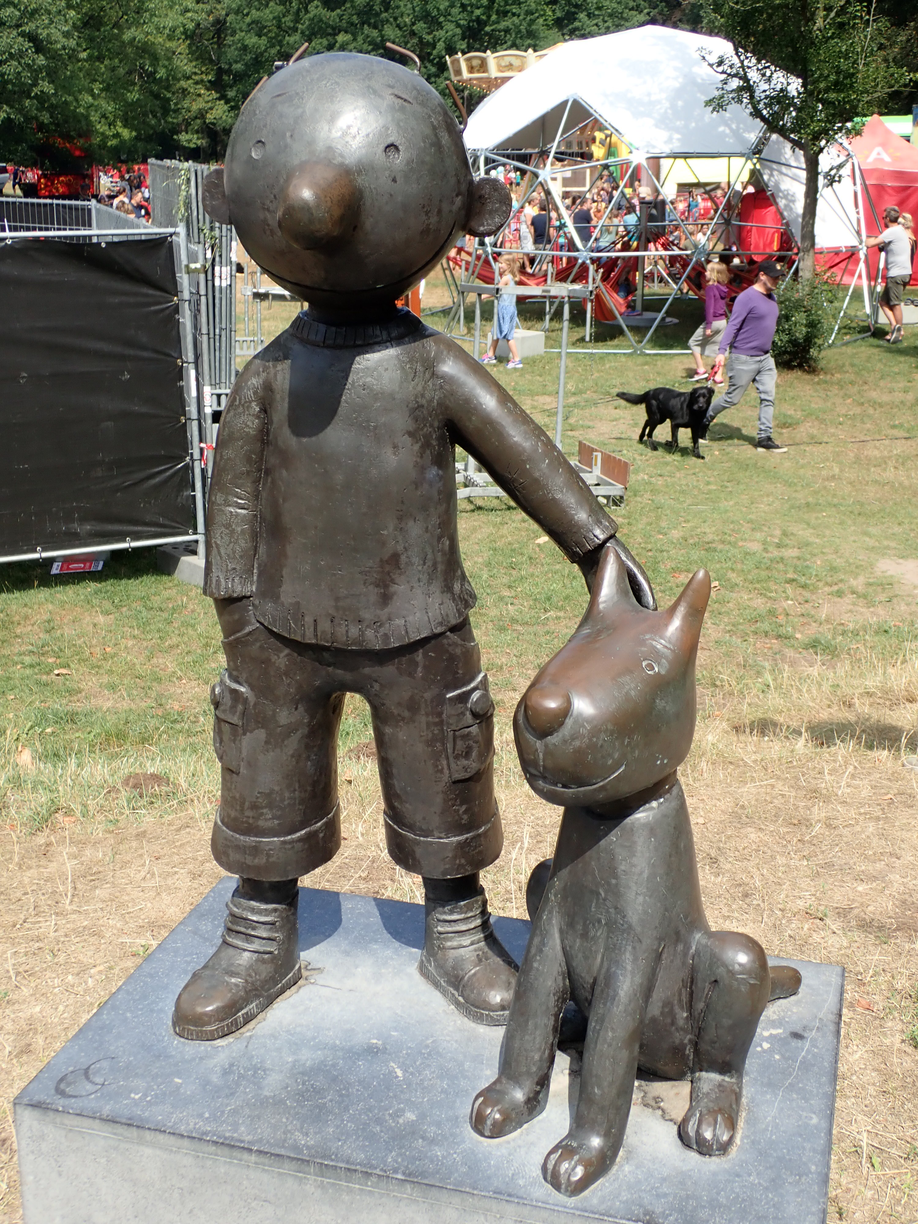 Standbeeld van Jules in Hof de Bist in Ekeren